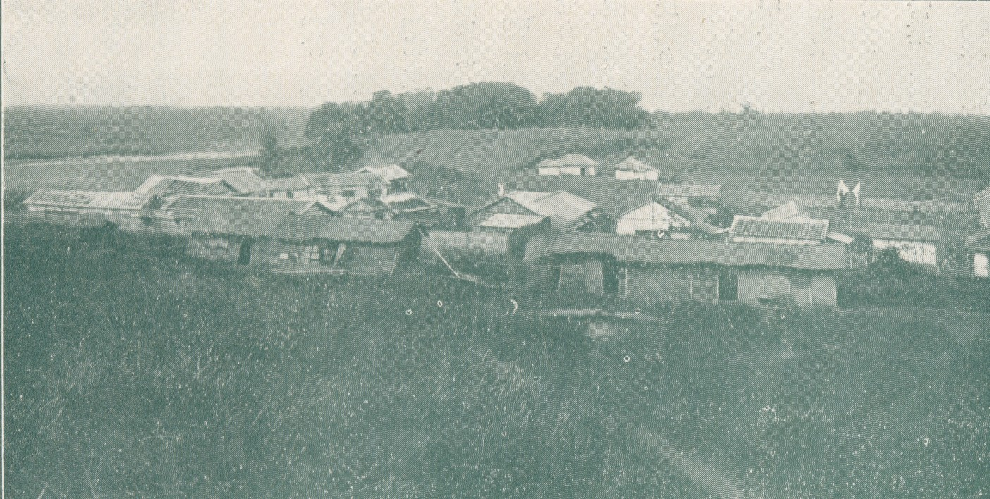 中文（台灣）: 林內三菱製紙場